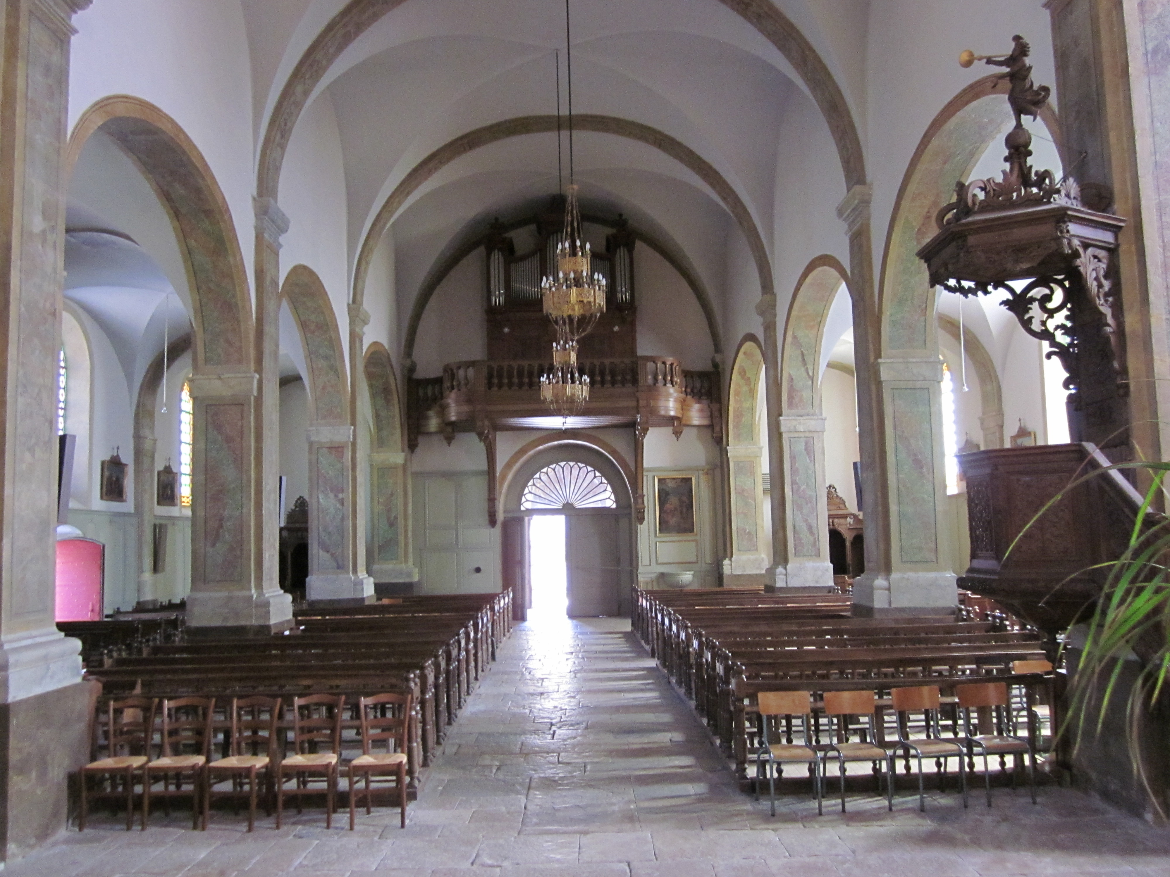 Nods (Doubs) - église - nef et orgue de Louis-François Callinet (dernier représentant de la dynastie des Callinet de Rouffach) de 1877, classé au patrimoine culturel par les Monuments Historiques.